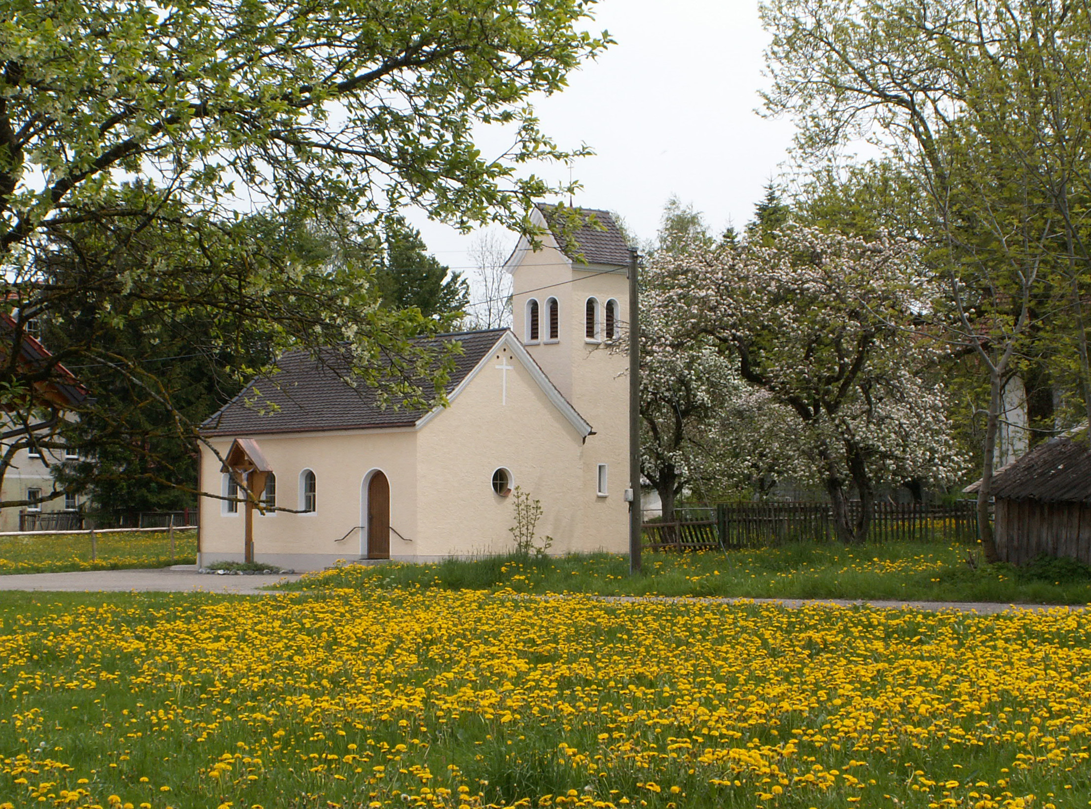 Kapelle in Dingisweiler, Ronsberg. Zustand nach der 2006/2007 erfolgten Renovierung mit baulicher Veränderung des Turms